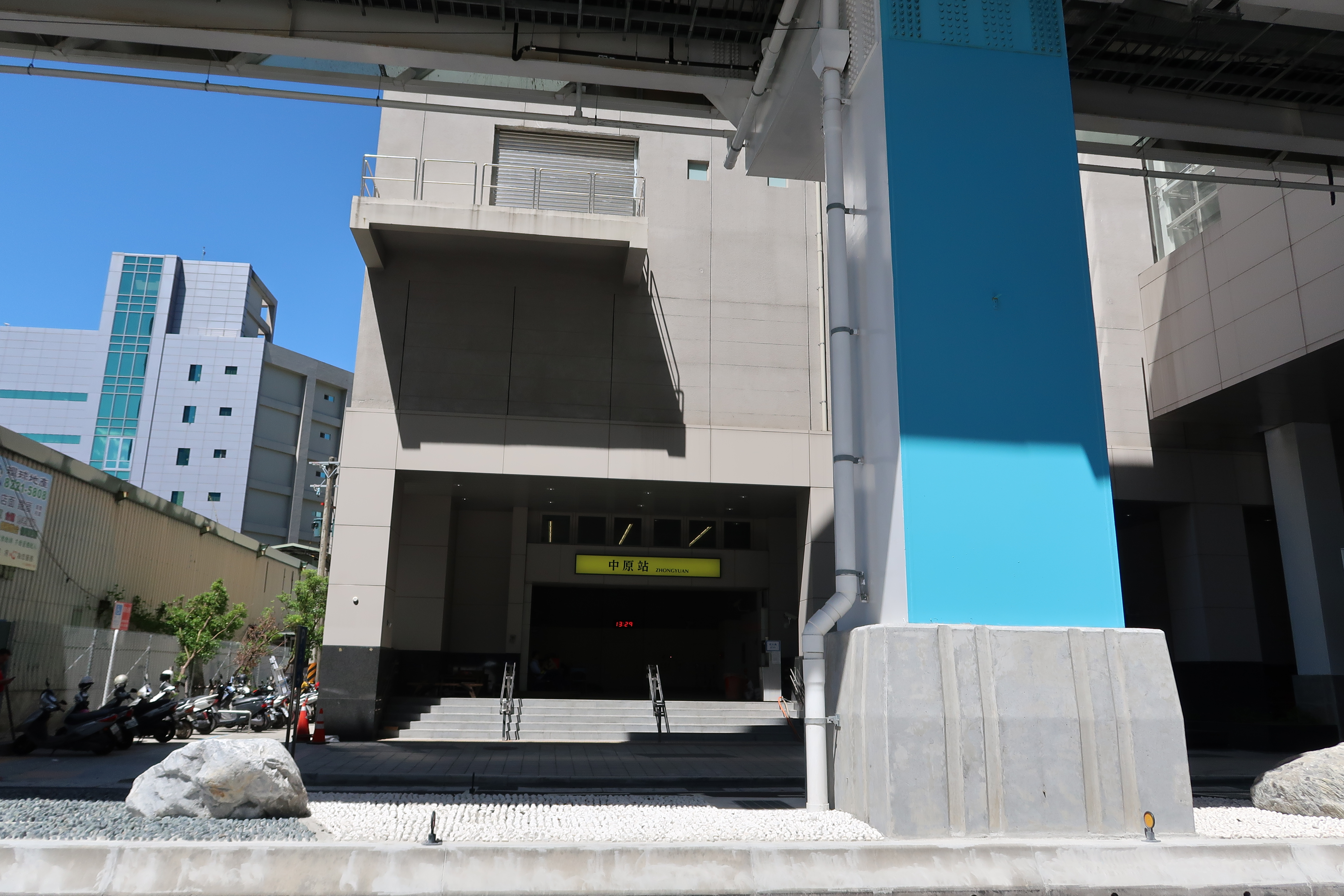 位於板南路北側的環狀線中原站出口